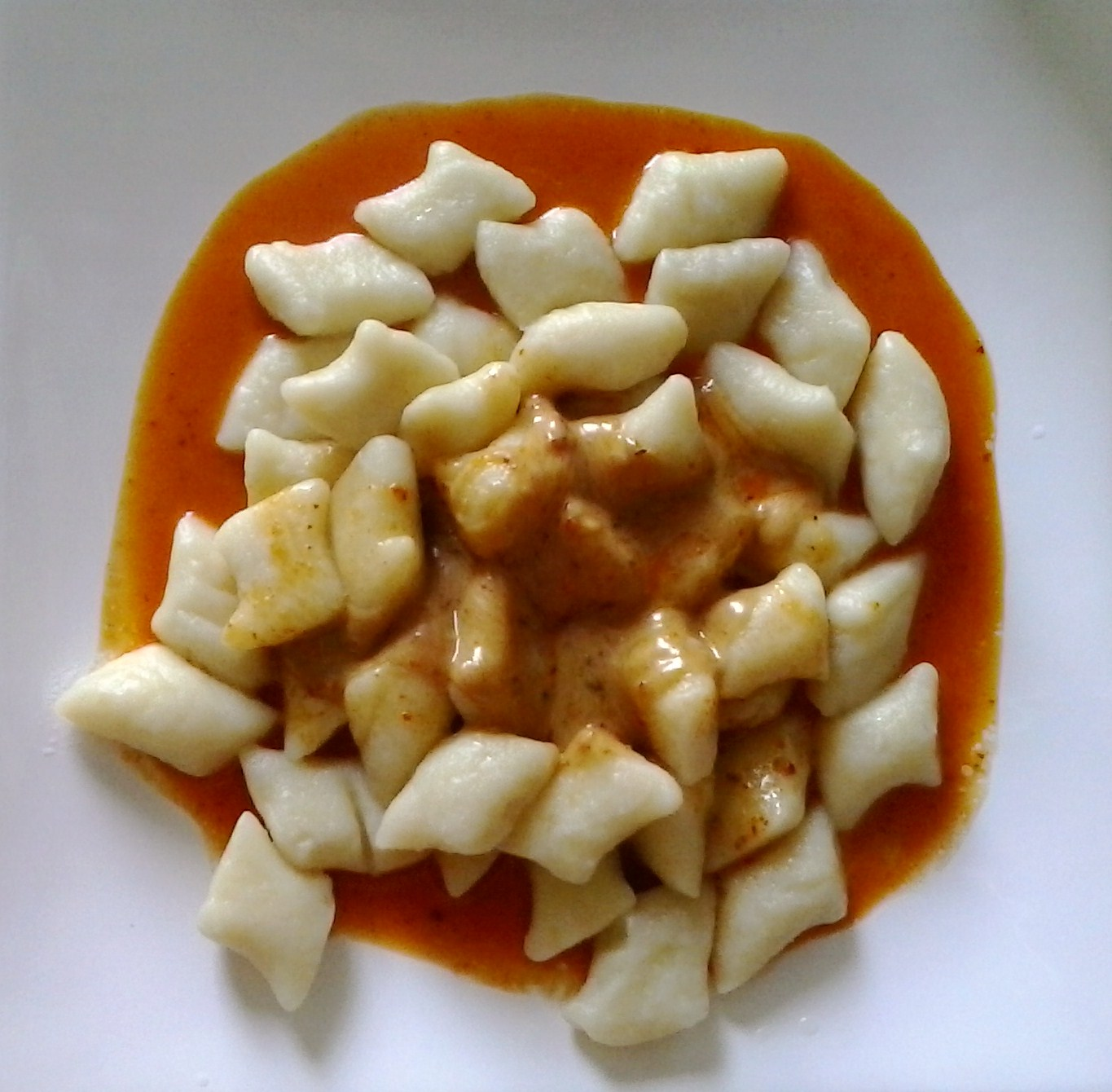 Kopytka w sosie pomidorowym (Poznań).